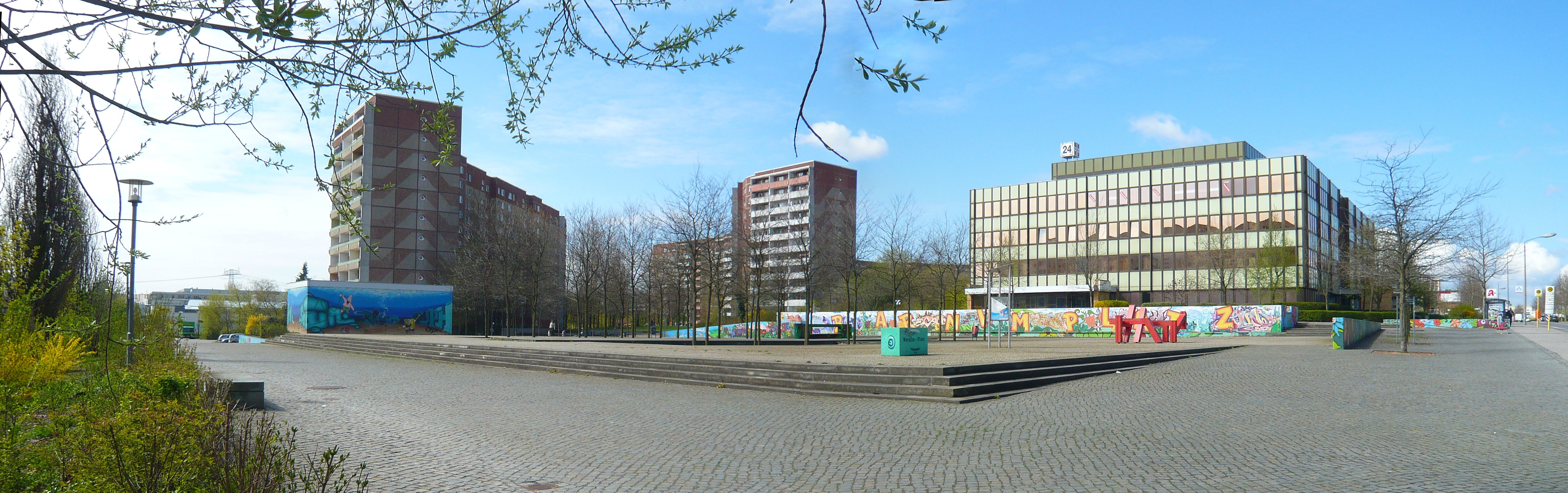 Ortsteil Berlin-Marzahn: Barnimplatz, Panorama